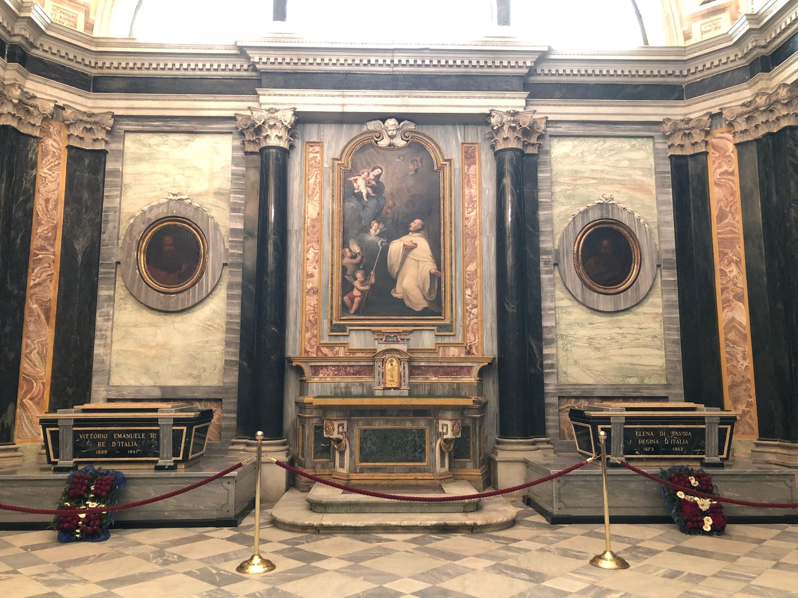 Tomba dei due reali al santuario di Vicoforte, nella cappella di San Bernardo